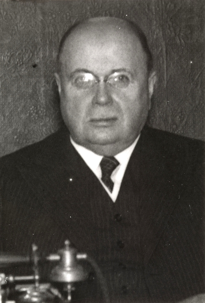 portrett, mann, overlege, brystbilde.